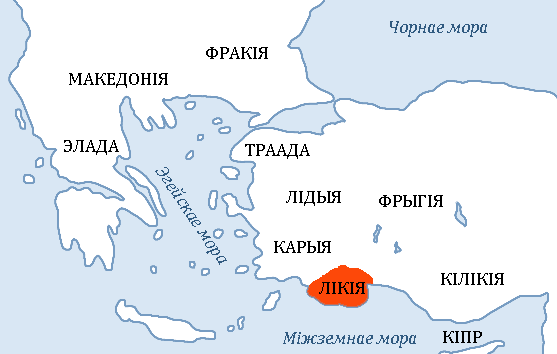 Лікія ў Малой Азіі